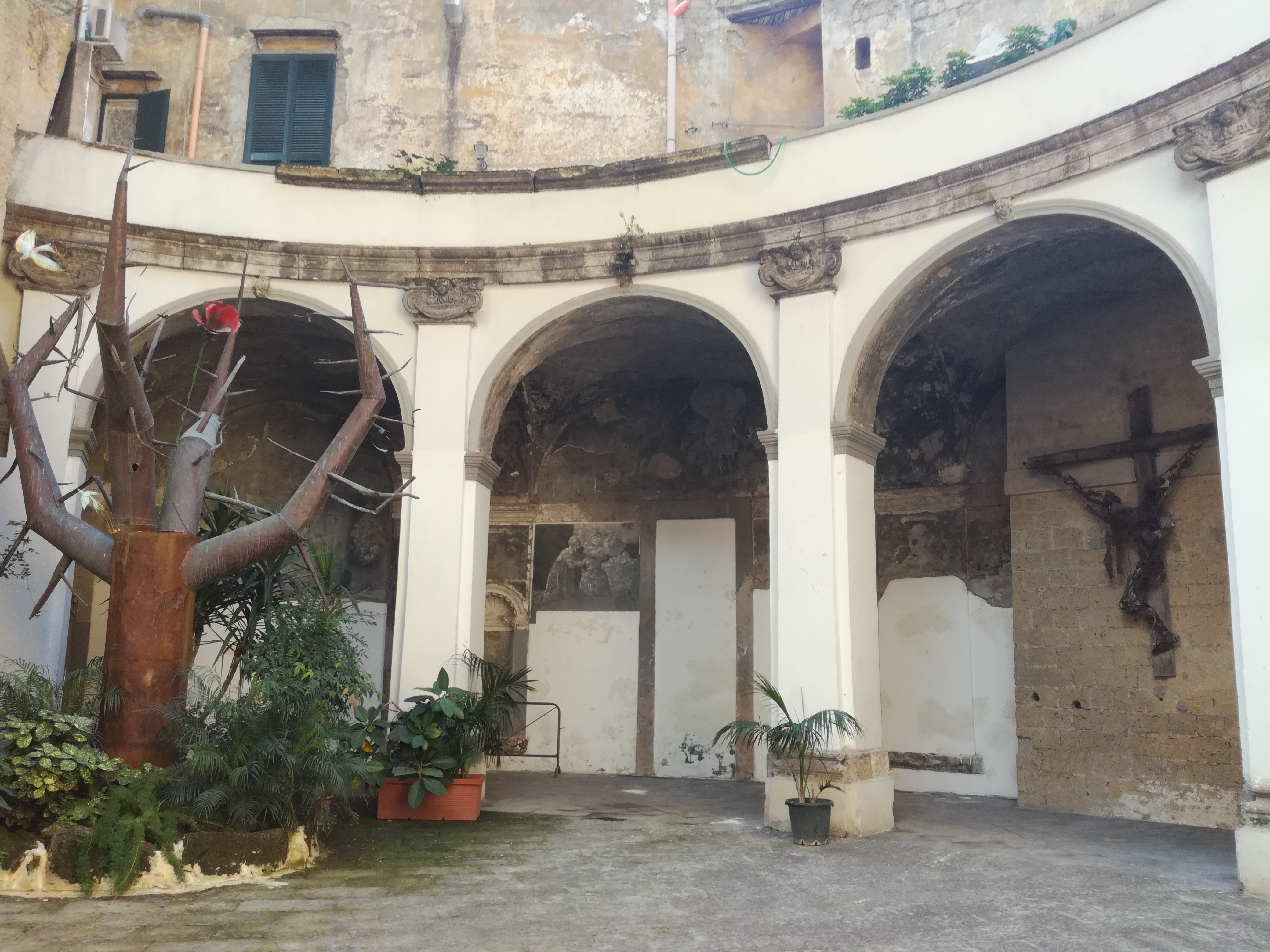 Basilica di Santa Maria della Sanità (Napoli)